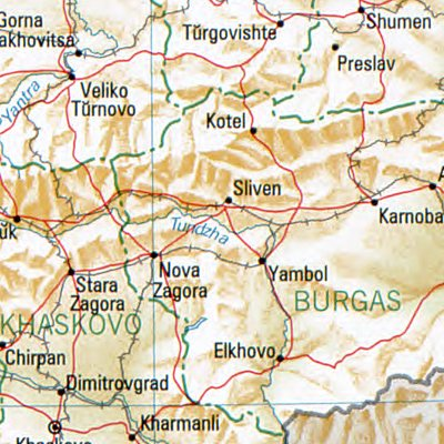 Sliwen - Lage des Ortes in Bulgarien